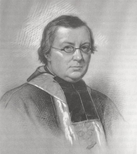 Gravure représentant le portrait de l'abbé Jean-Jacques Bourassé.